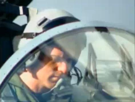 Ben Browder pendant le tournage de Continuum à bord d'un F15